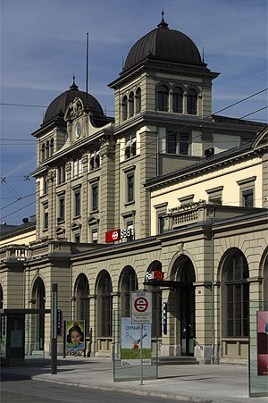 Bahnhof Winterthur (Nr. 03.1-5436)